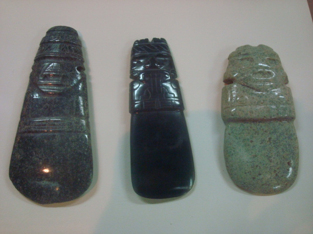 Colgantes de jade que representan chamanes. Museo del Jade, San José de Costa Rica.